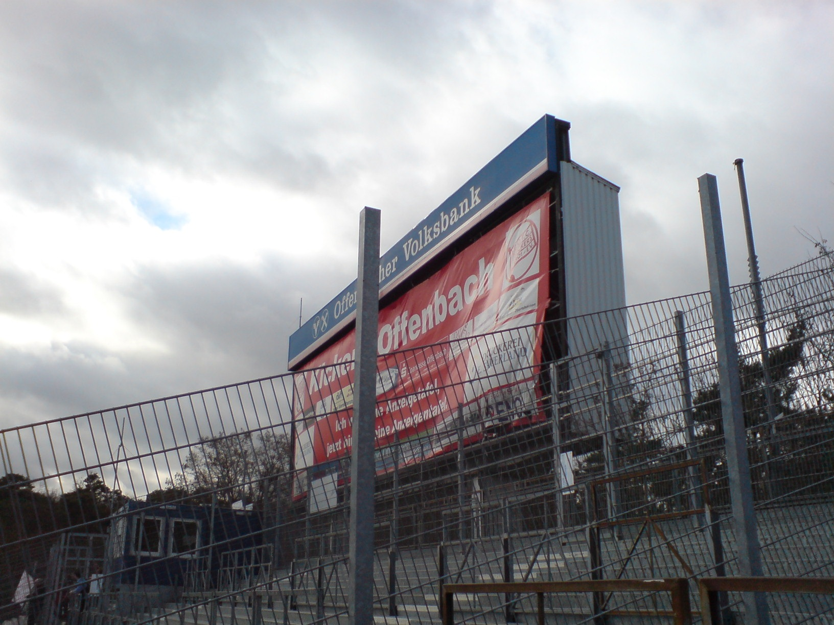 An der dysfunktionalen Anzeigetafel im Stadion auf dem Bieberer Berg in Offenbach wurden Werbetransparente aufgehängt (Aufnahme beim letzten Heimspiel im alten Stadion vor Beginn der Umbauarbeiten, gegen Wehen, 23. Spieltag 2010/2011